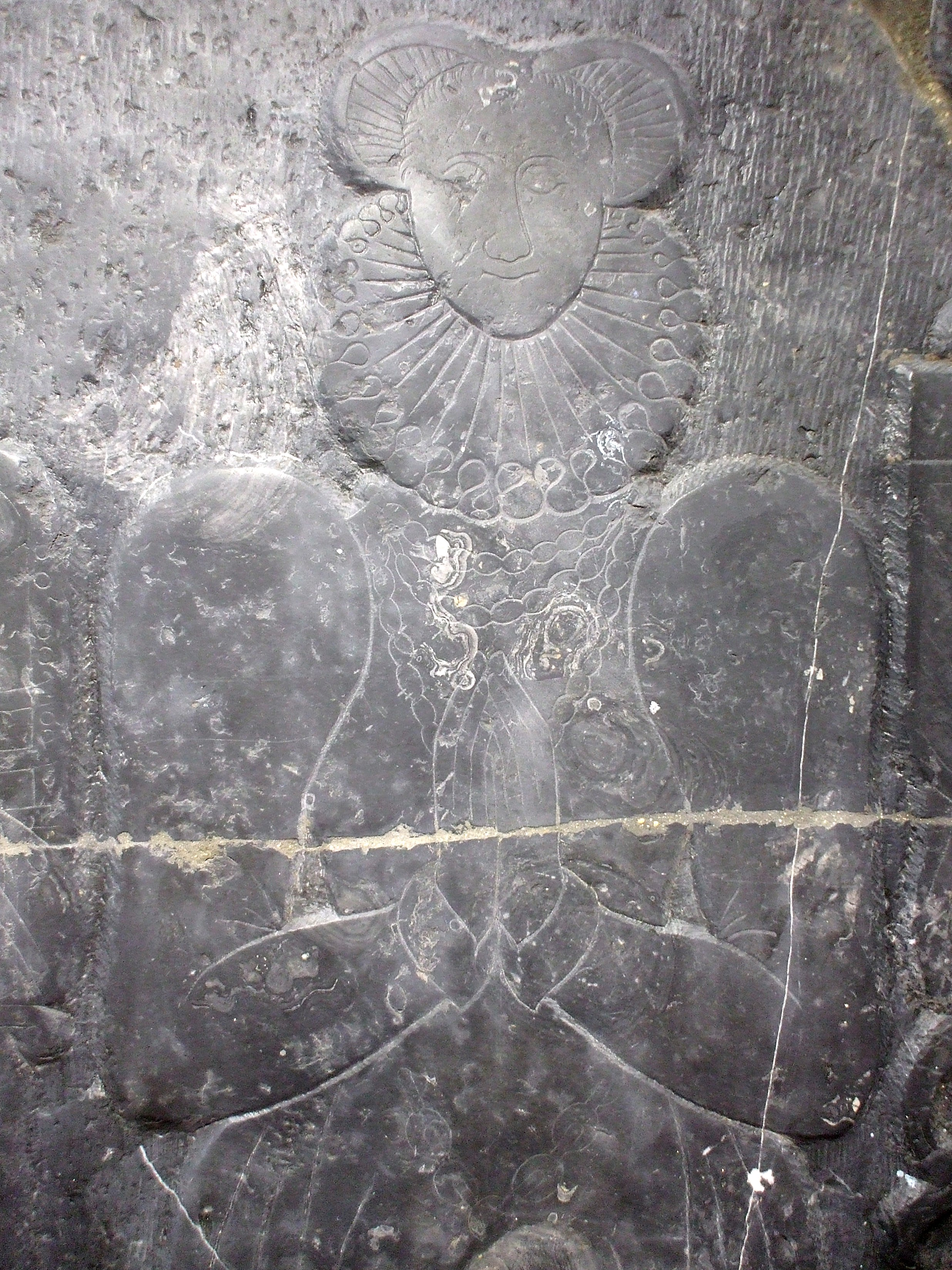 Pierre tombale de Jean Rasoir seigneur de Beuvrages ,Jeanne de Vendegie haut, Hainaut, monument historique